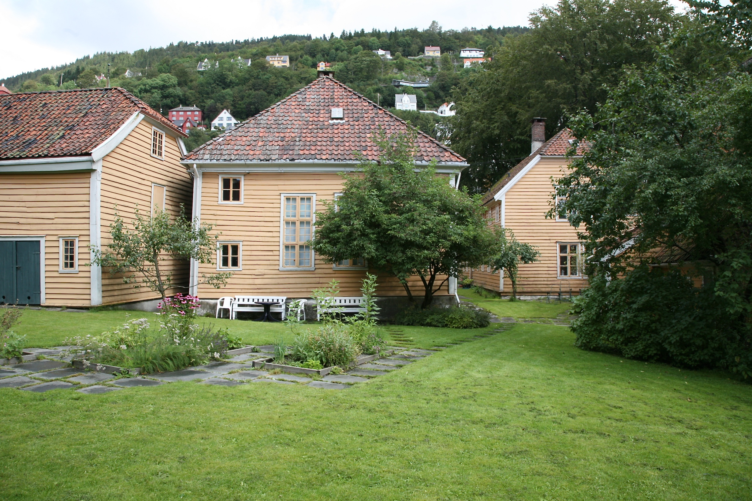 Lepramuseet i Bergen.